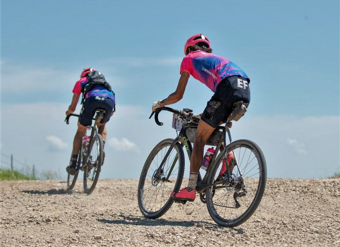 EF Education First riders in Dirty Kanza